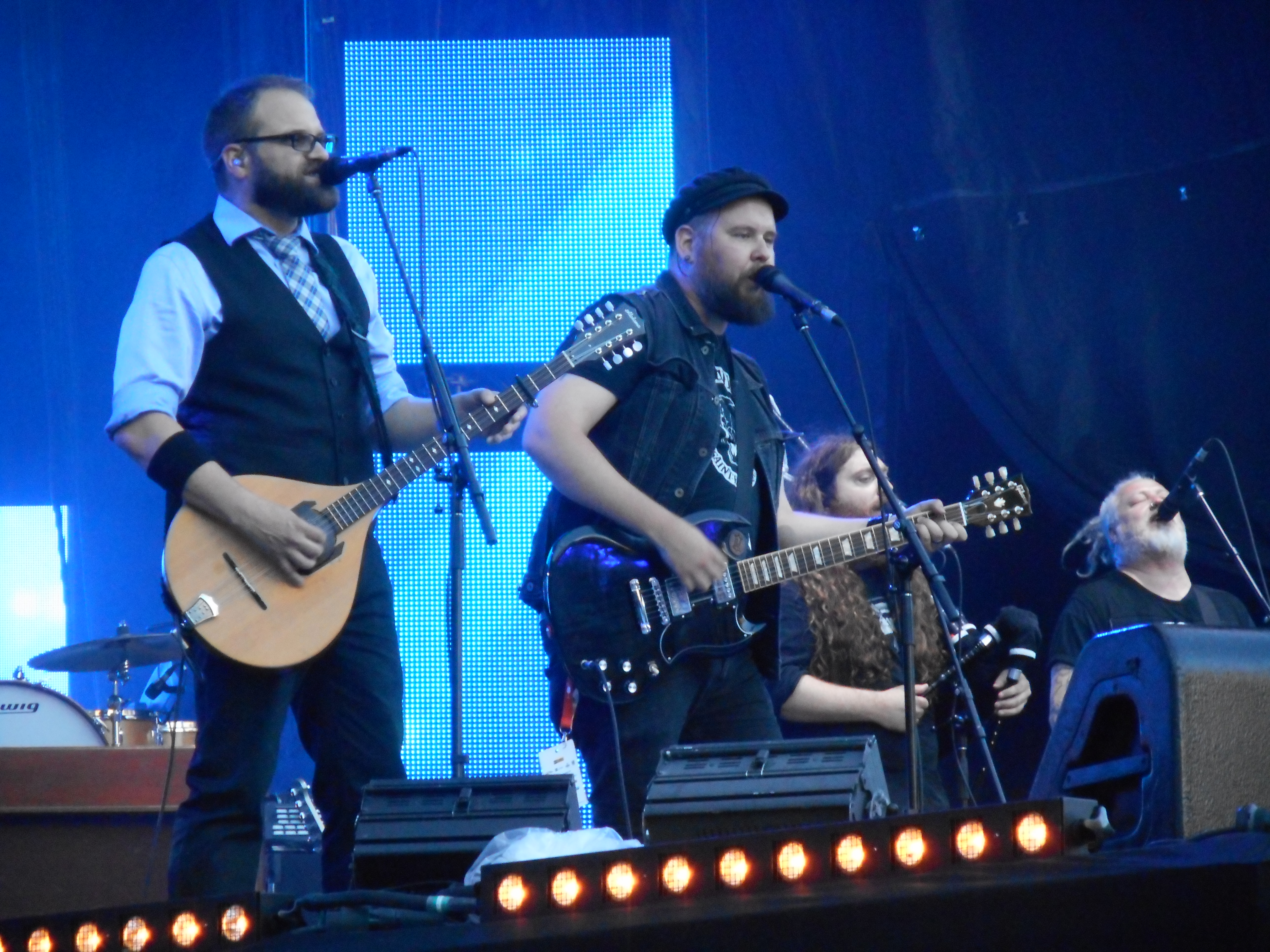 Fête nationale du Québec à Montréal, place des Festivals